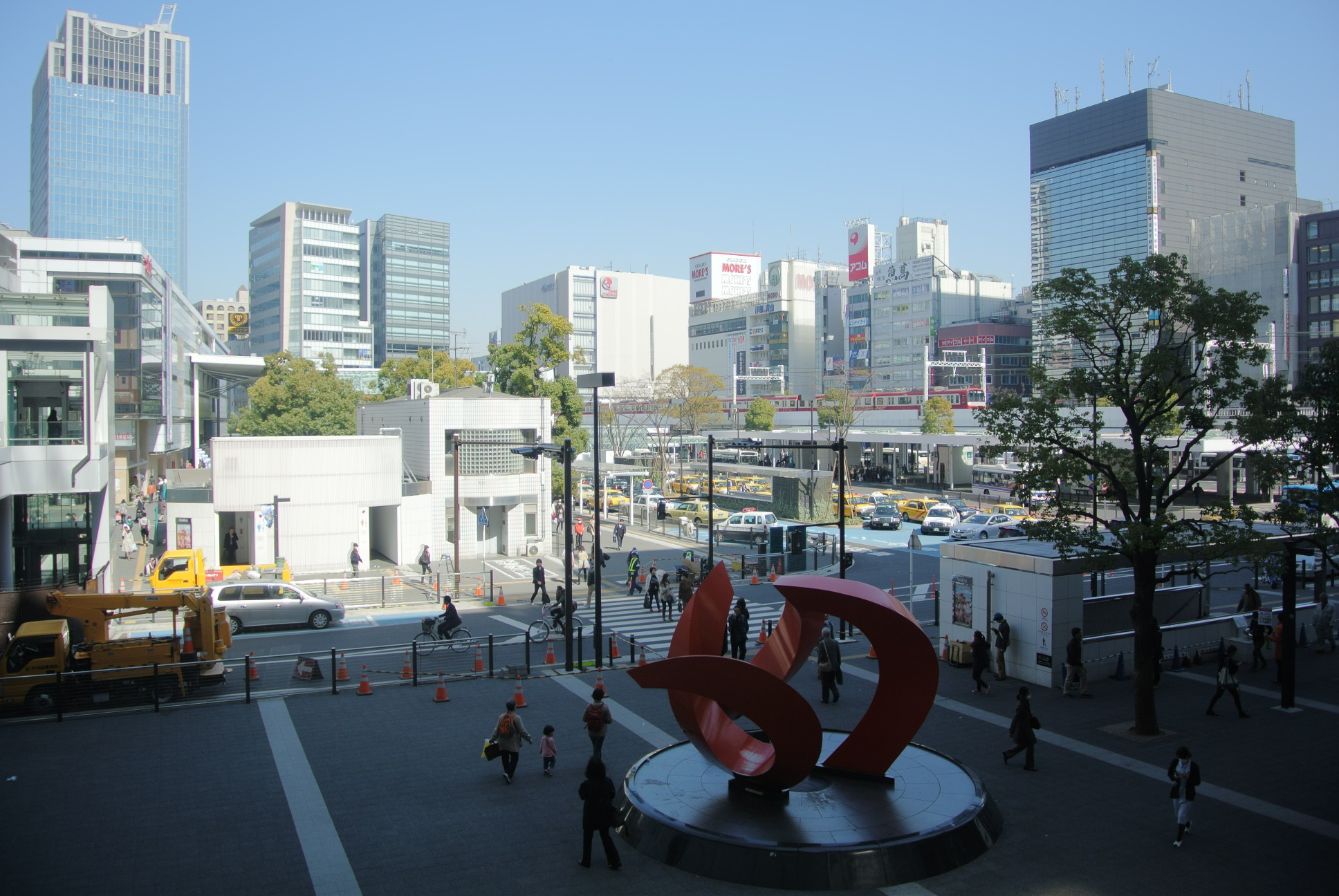 川崎駅前